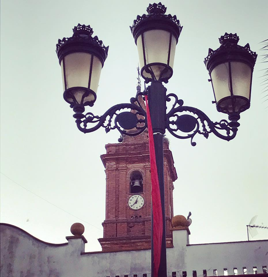 Torre de la iglesia de Alosno, Huelva.